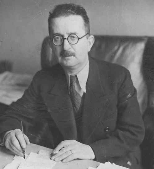 Mieczysław Niedziałkowski